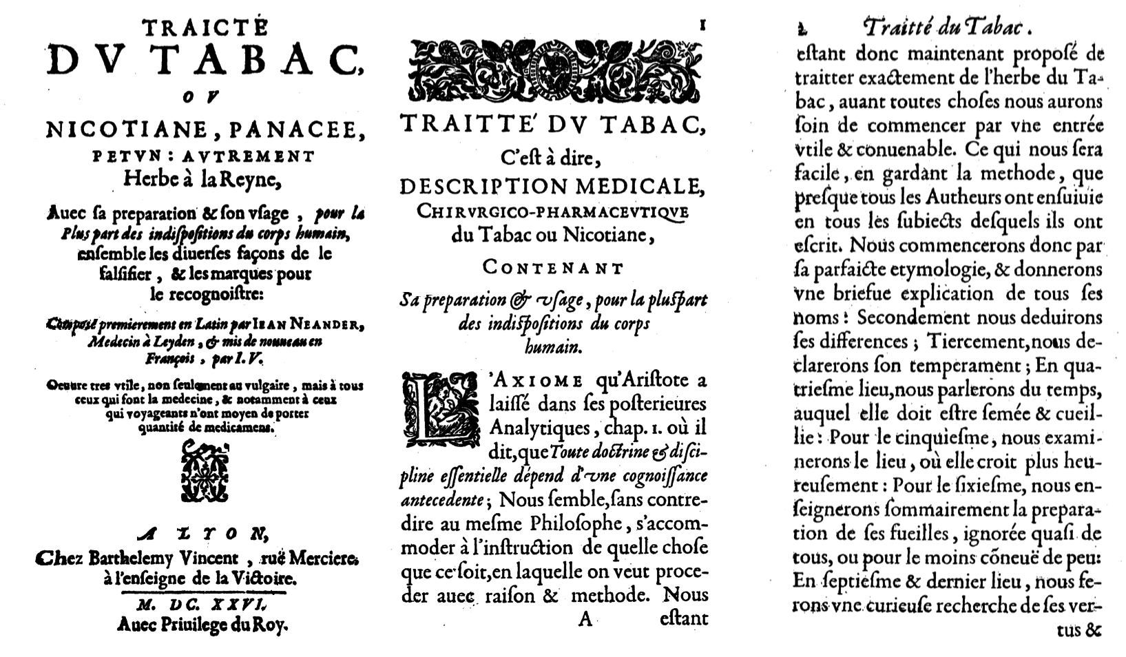 Page de titre et premières pages de la traduction française du Traité du tabac de Jean Neander (1625).